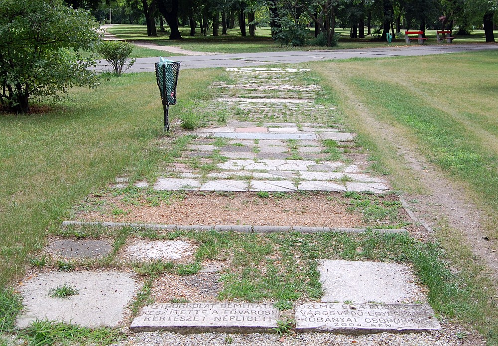 Útburkolat bemutató a Népligetben. Készítette a Fővárosi Kertészet Népligeti üzeme és a Budapesti Városvédő Egyesület Kőbányai csoportja. (2004)Varied road pavements. Created by Budapest Metropolitan Gardening Népliget branch and local civil movement in 2004.